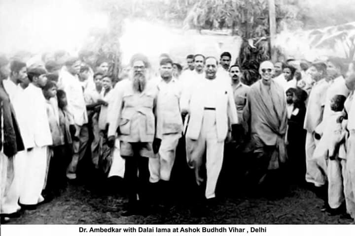 दिल्लीमधील अशोक बुद्ध विहारात दलाई लामा सोबत डॉ. बाबासाहेब आंबेडकर